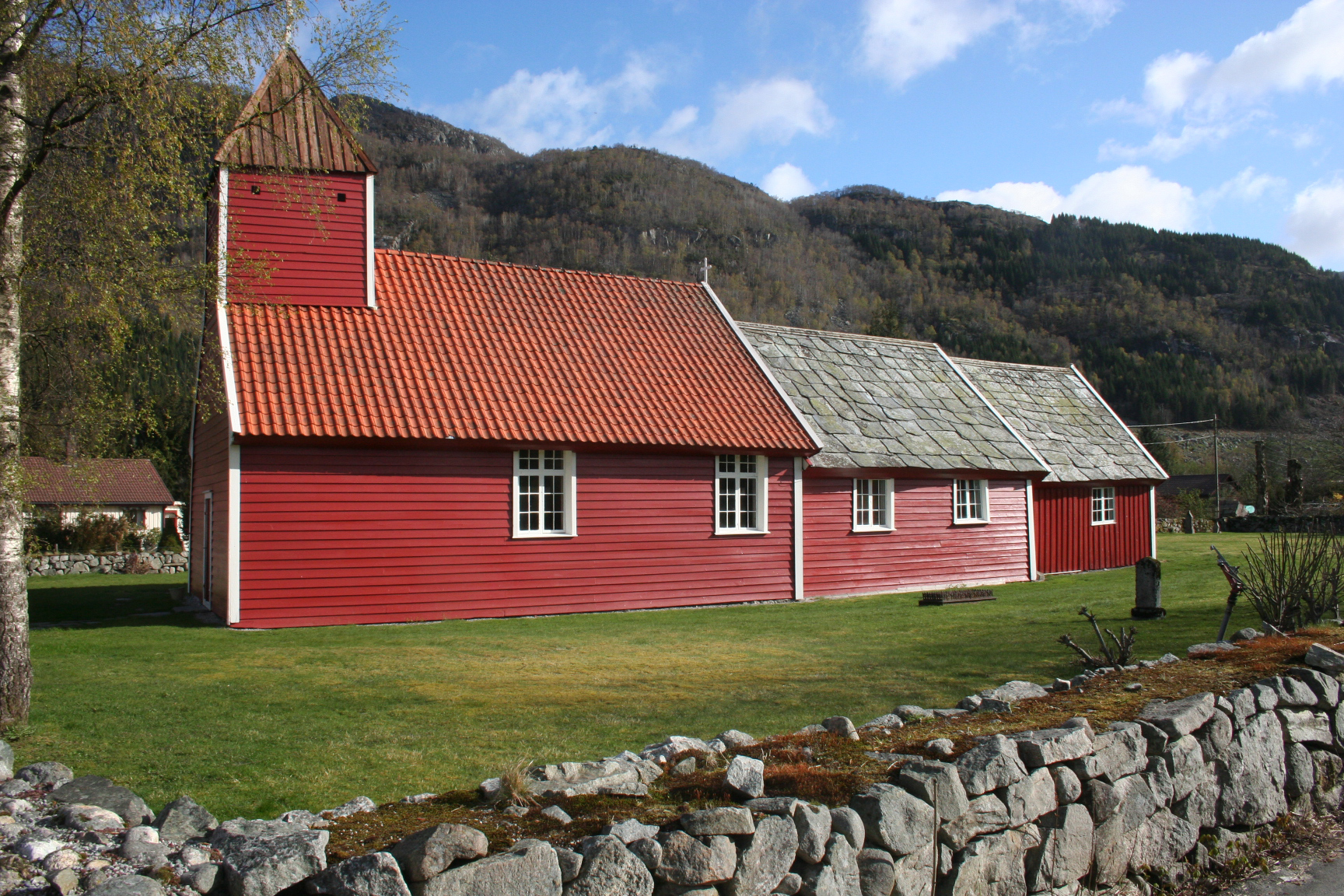 Årdal Alte Kirche